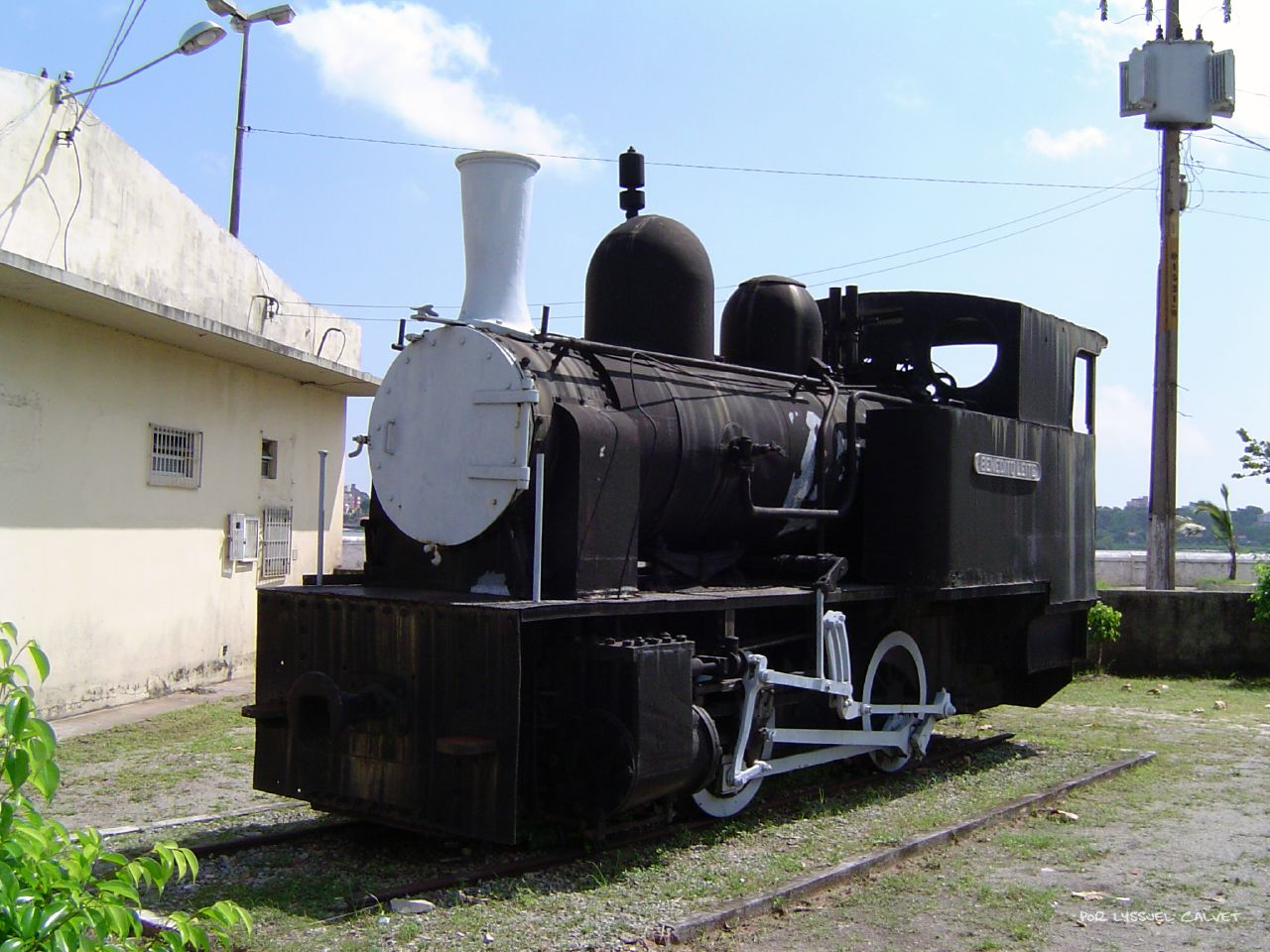 Antiga Rede Ferroviária Federal S.A. - RFFSA.